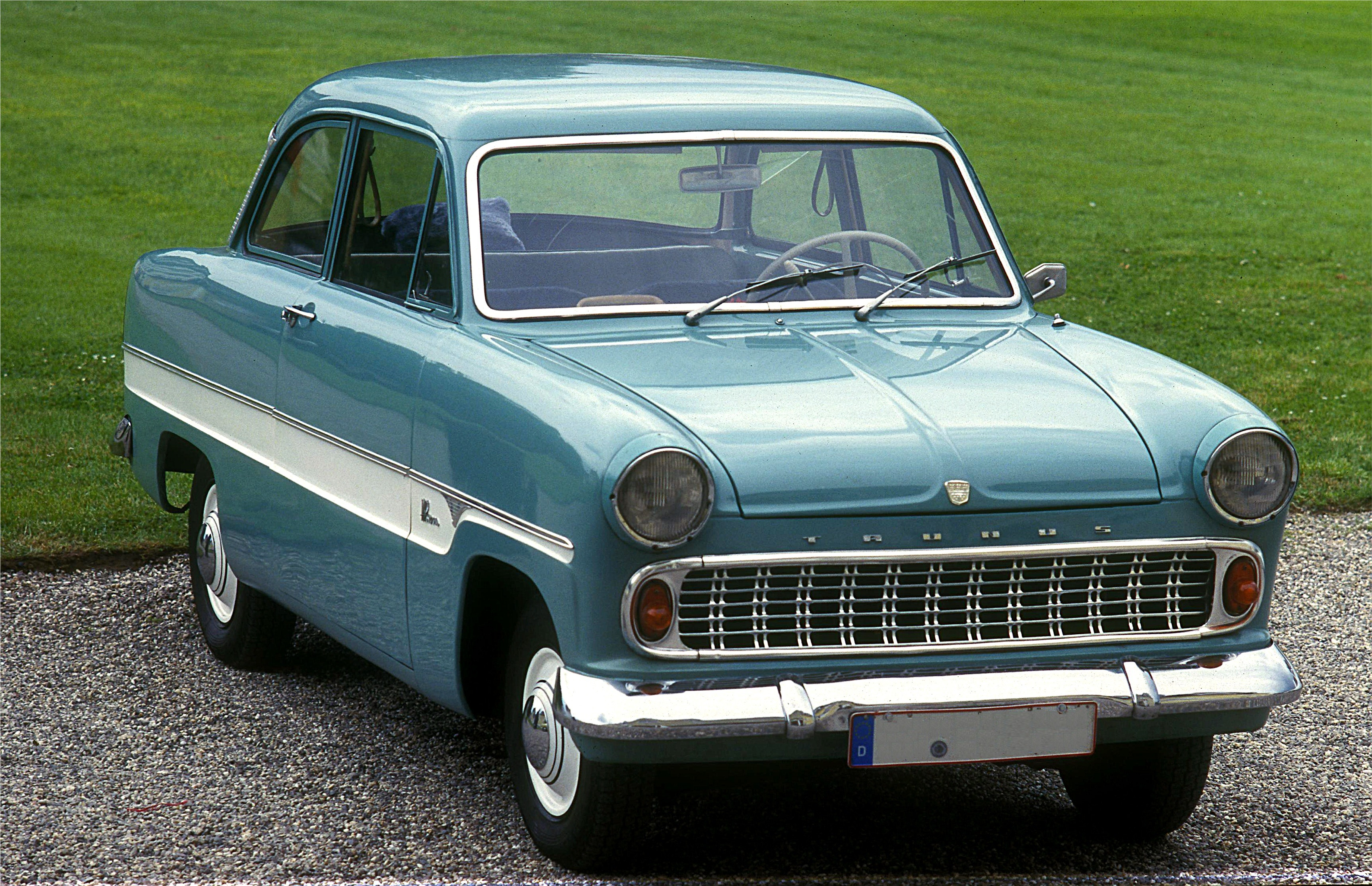 Bildbeschreibung: Ford 12 M (Bauzeit 1959 - 1962) Fotograf: Lothar Spurzem Datum: 2000 bei einer Oldtimerveranstaltung in Neuwied